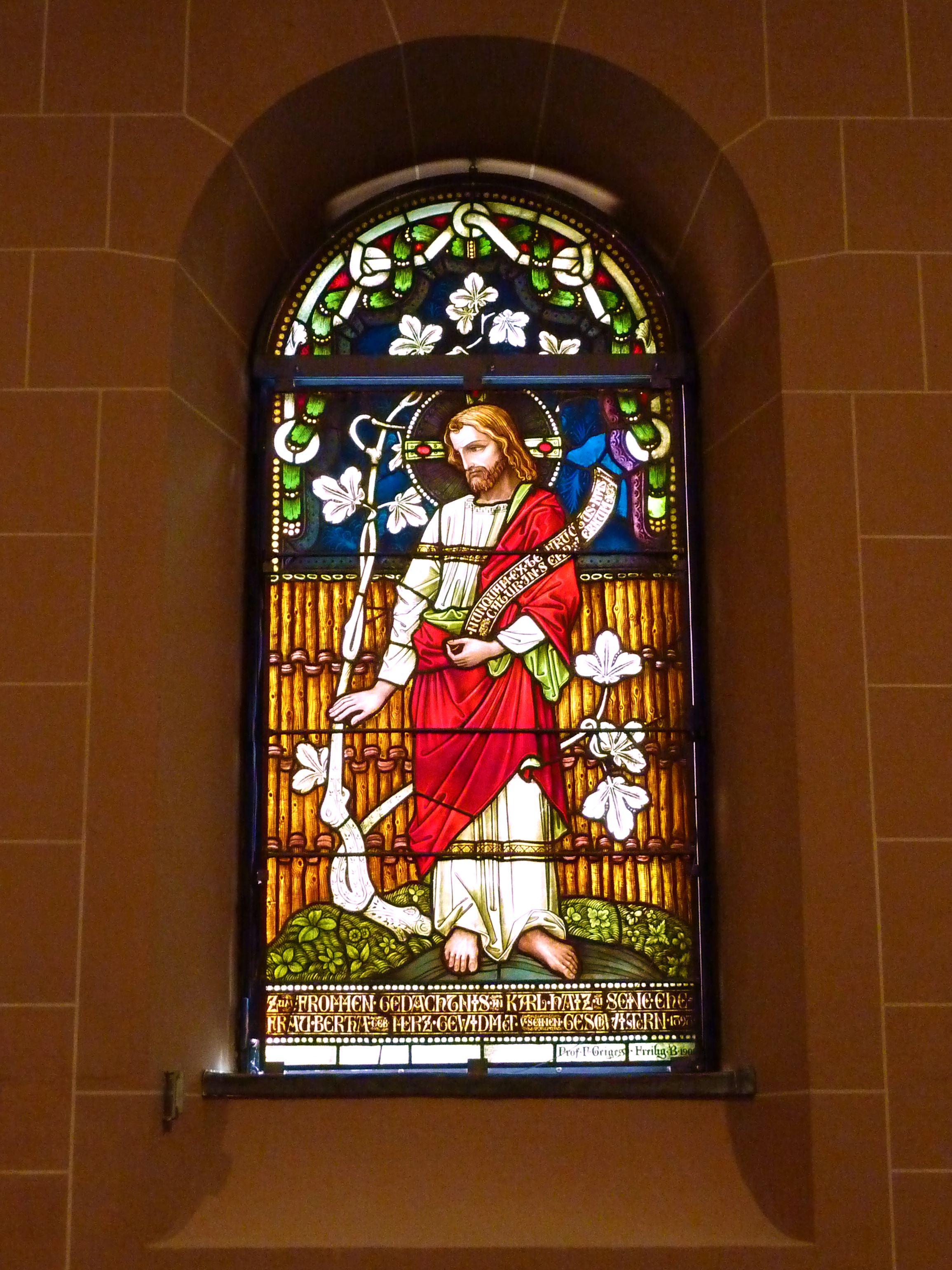 Darstellung der Verfluchung des Feigenbaums am bunten Glasfenster von Fritz Geiges in der Johanneskirche, Freiburg im Breisgau